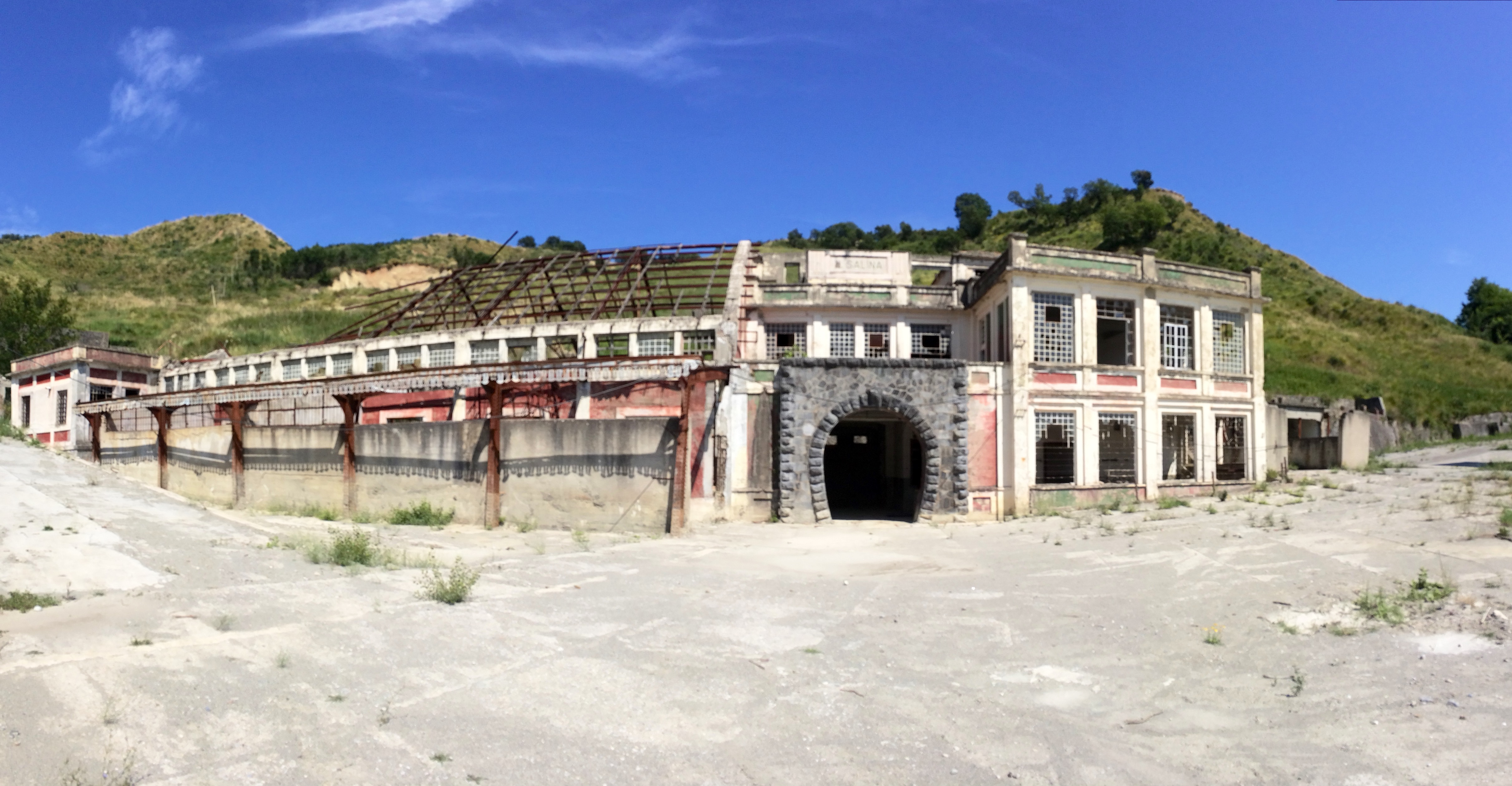 Panoramica dell'esterno della Miniera di Salgemma di Lungro (CS) a Luglio 2014.